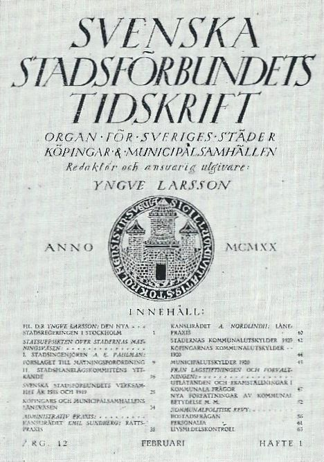 Svenska stadsförbundets tidskrift, årgångarna 12-45